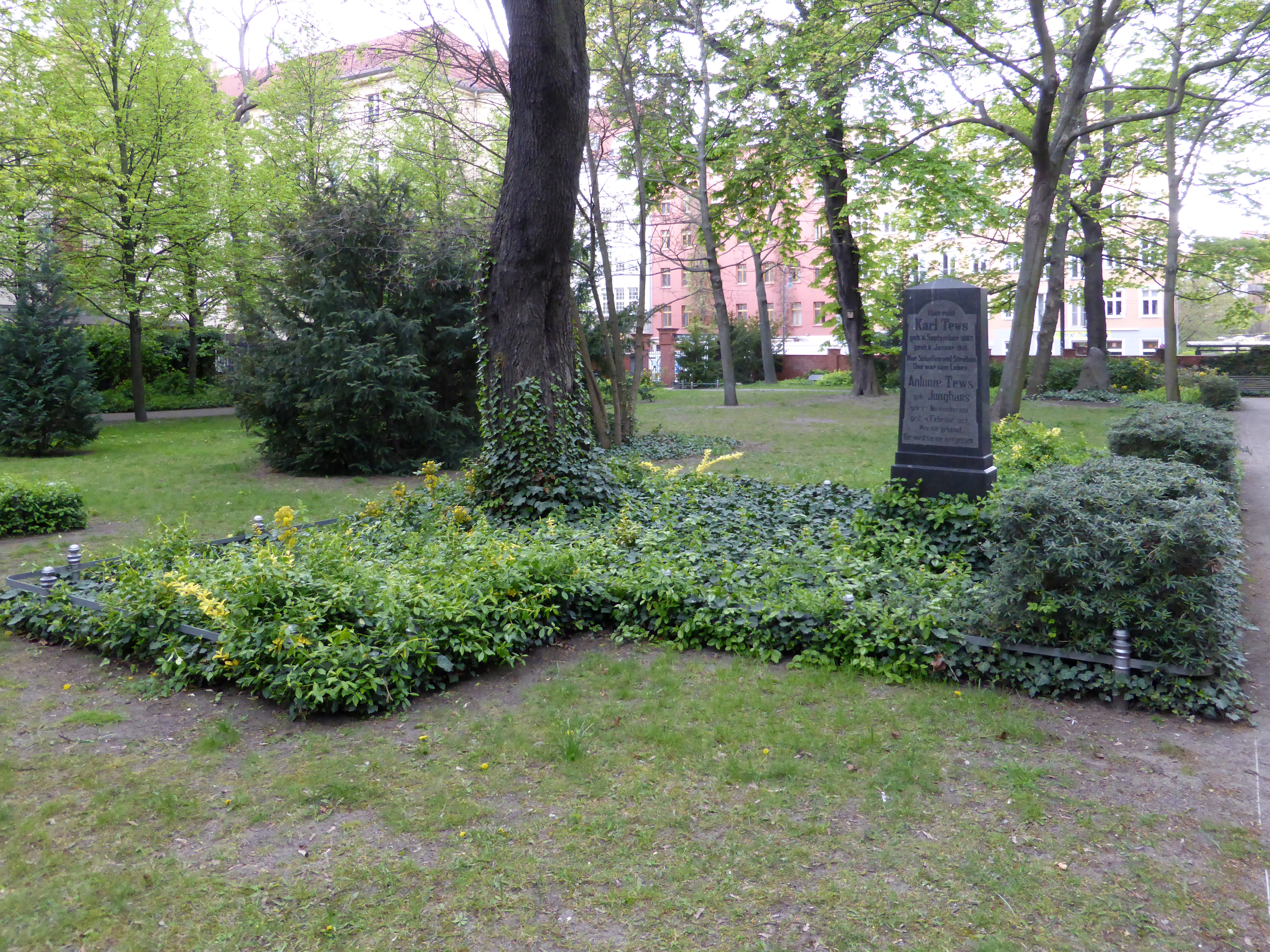 Friedhofspark Pappelallee, Berlin-Prenzlauer Berg.